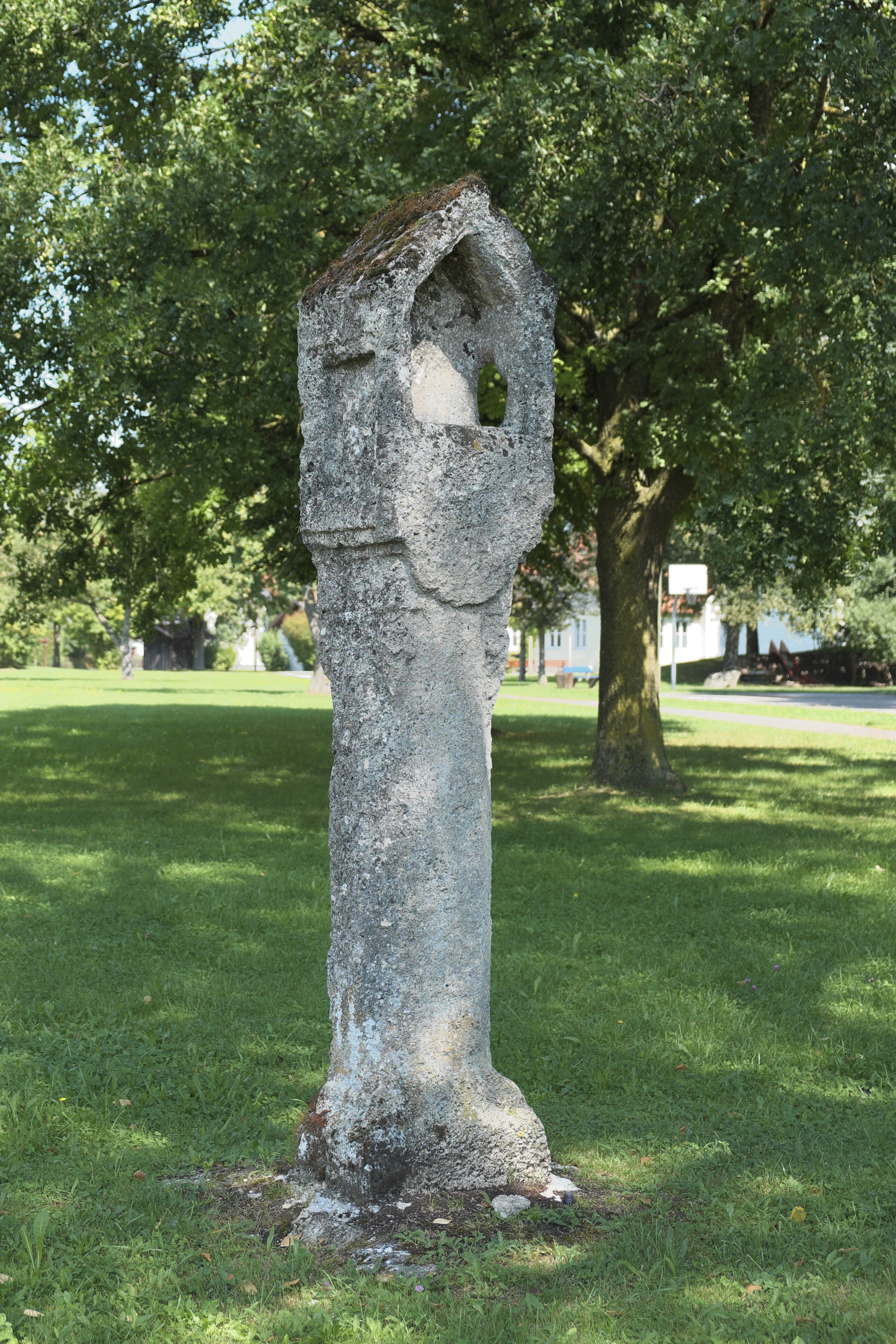 Bildstock in Eching am Ammersee im Landkreis Landsberg am Lech (Bayern/Deutschland)